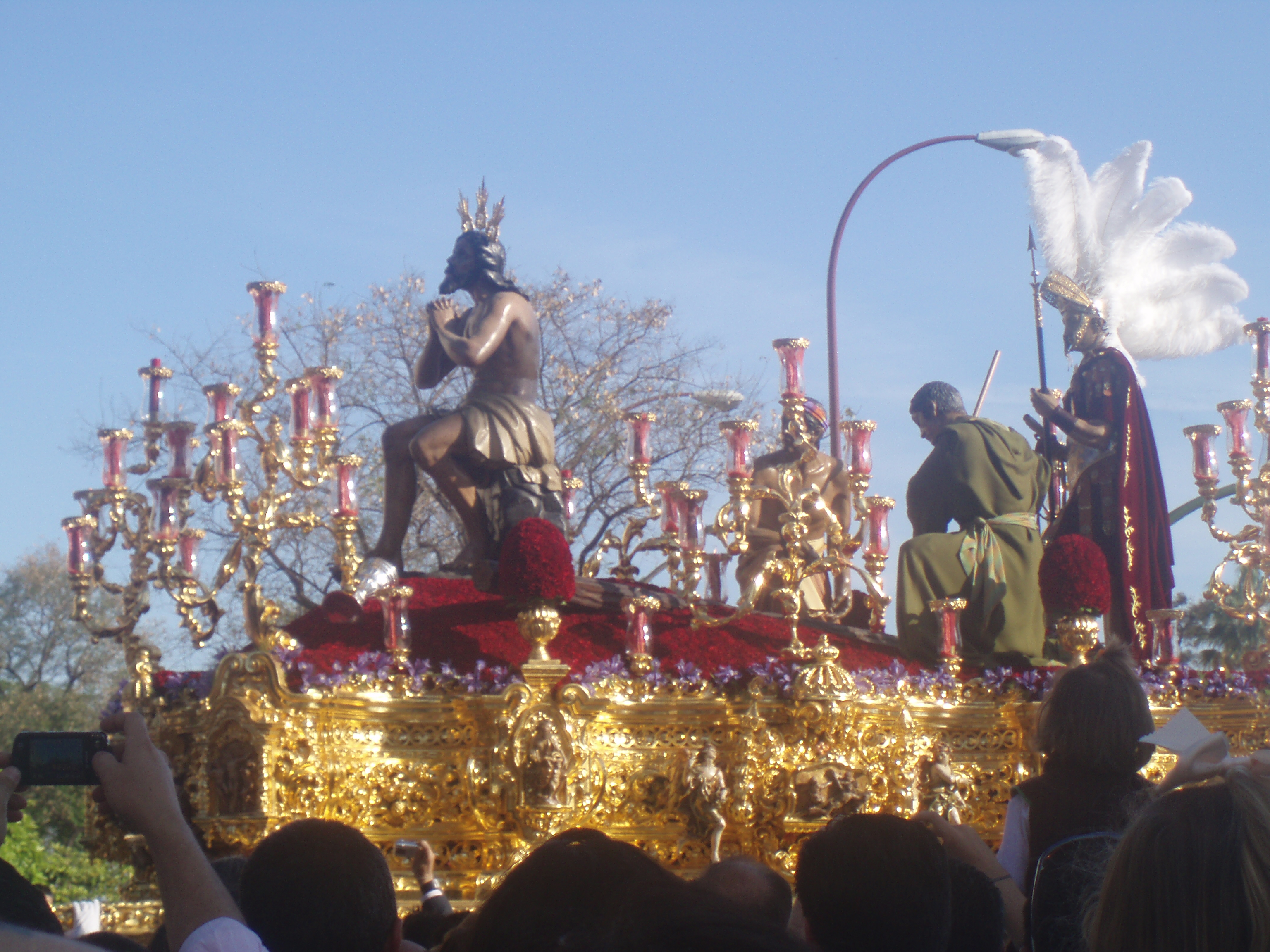 Nuestro Padre Jesús de las Penas, de la hermandad de la Estrella (Sevilla)